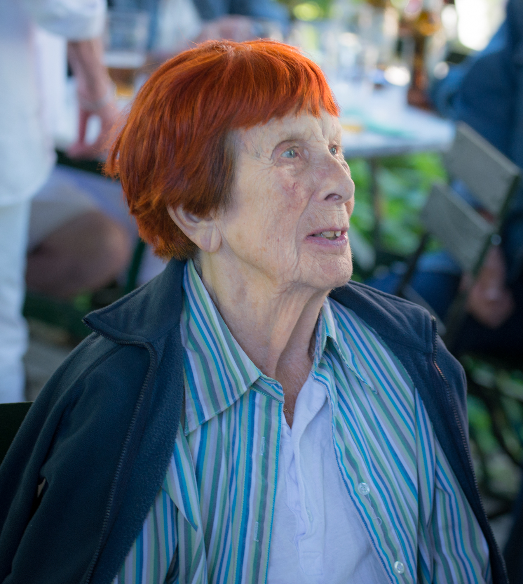 Susanna Ramel under utdelningen av KaRAMELodiktstipendiet 2018.